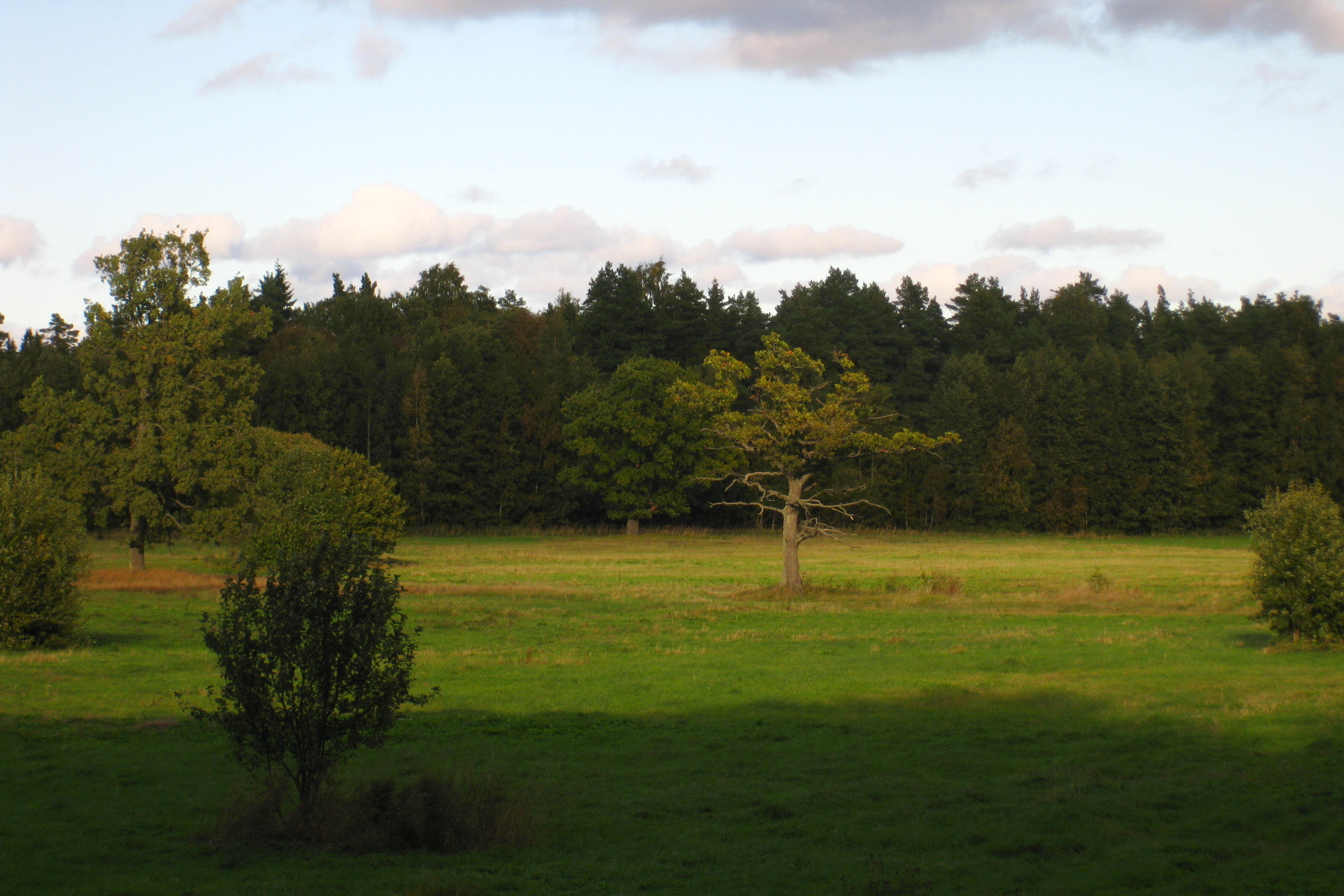 Niit Mäealuse MKA-l (kohalik kaitstav objekt) Mäealuse tee ääres